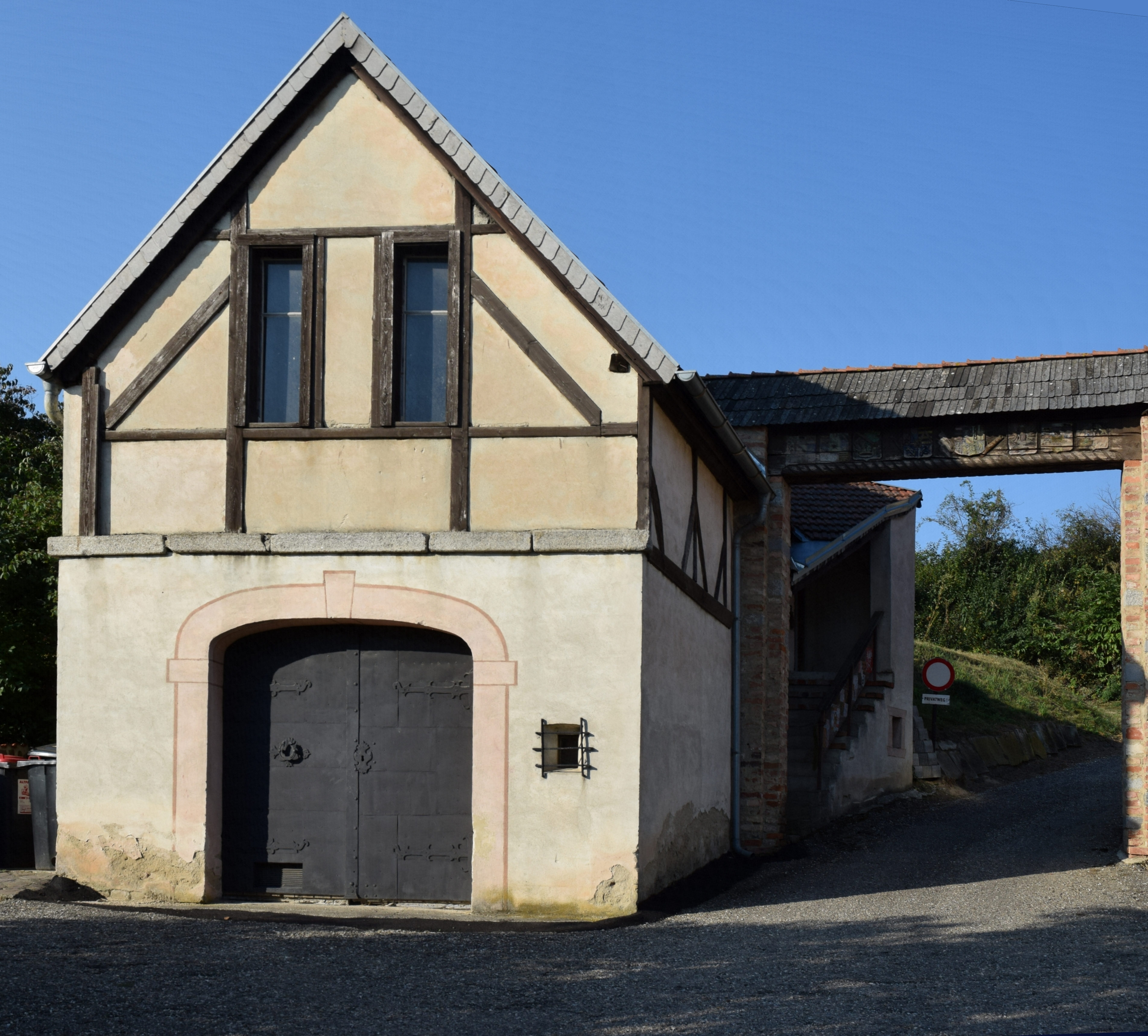 Detail der Gedenkstätte an die beginnende Befreiung Wiens während der Türkenbelagerung 1683